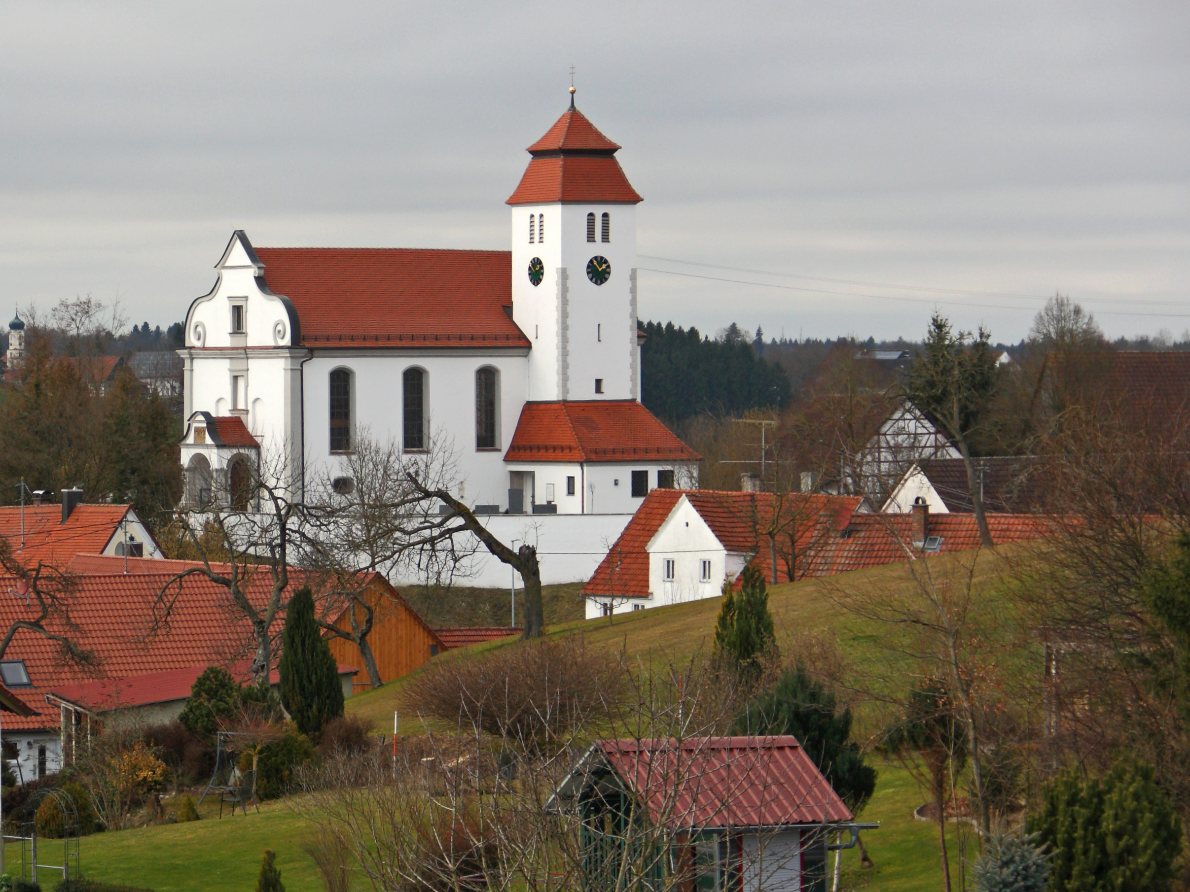 Kath. Pfarrkirche Mariä Himmelfahrt in Unterbleichen; Ansicht der 1712/13 von Simpert Kraemer erbauten und nach Norden gerichteten Kirche von Südosten